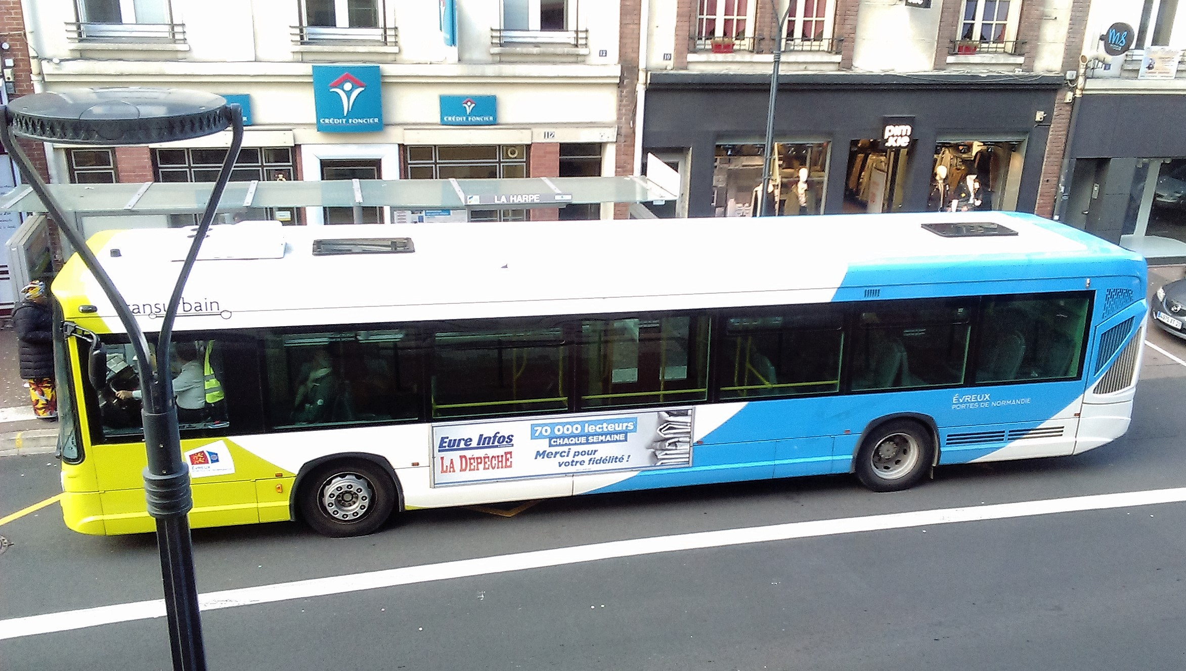 Evreux (27) - tour du 14 novembre 2017 - rue de la Harpe.